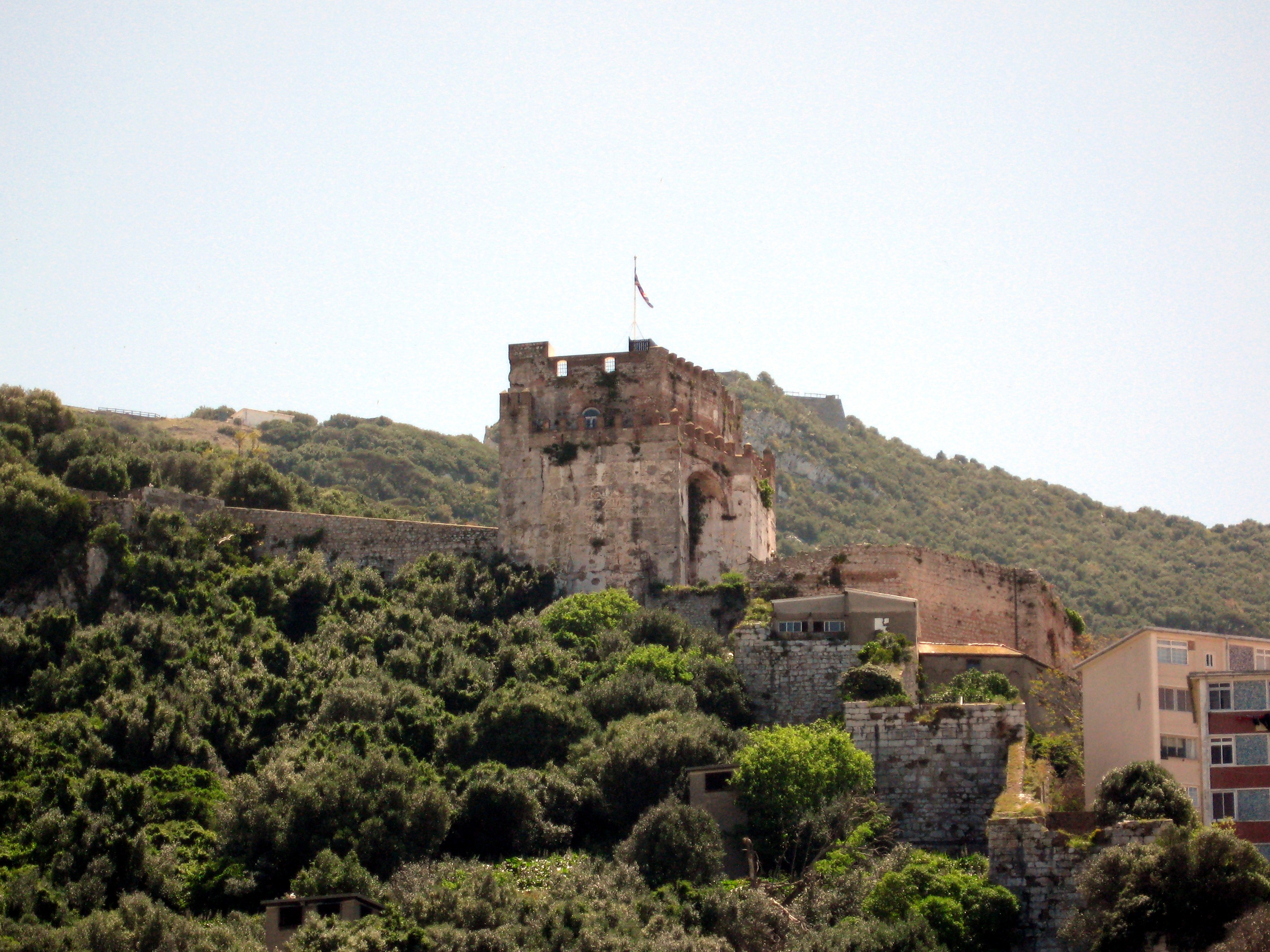 Maurenburg (Moorish Castle) in Gibraltar